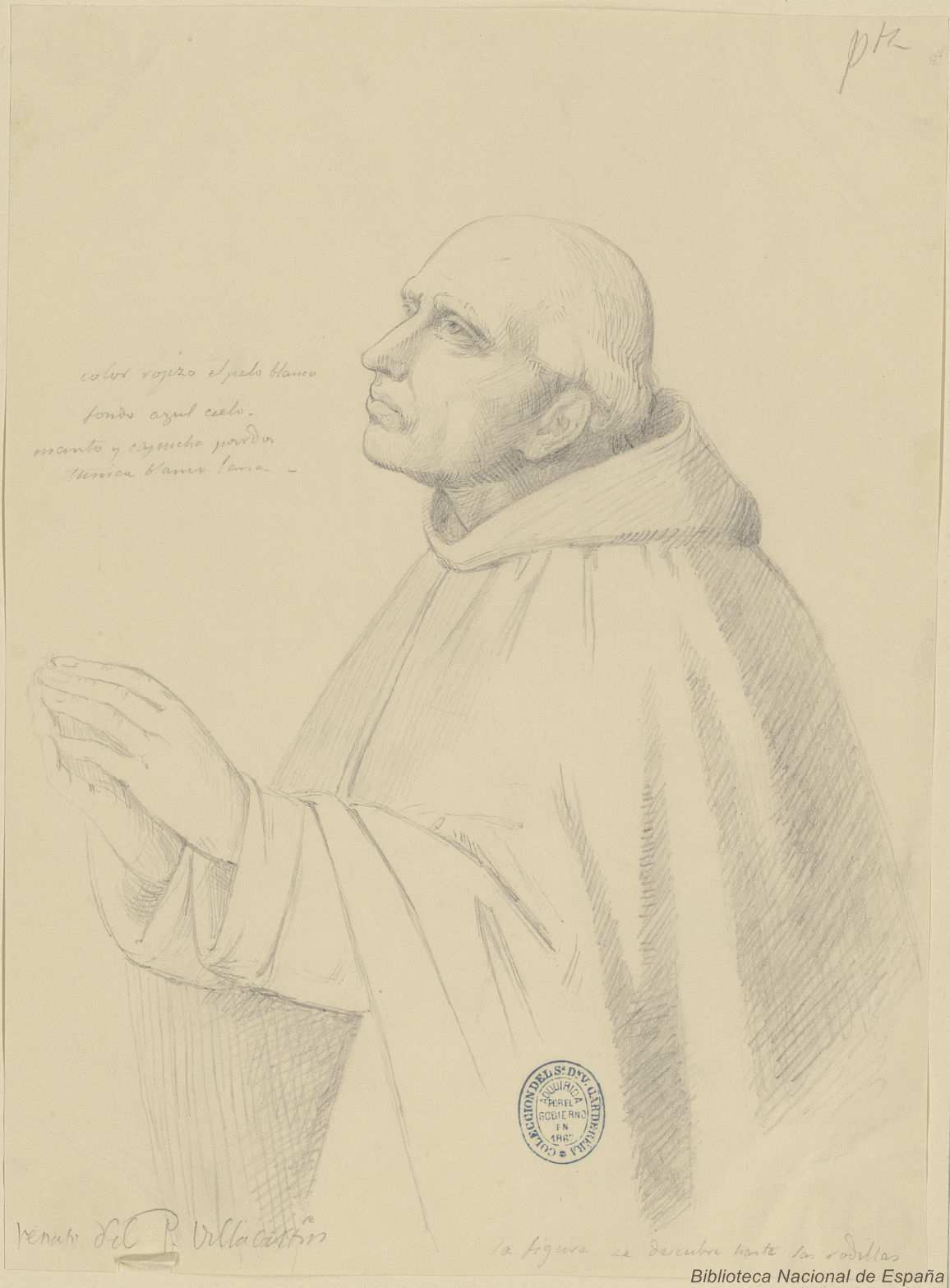 Valentín Carderera: Retrato de fray Antonio de Villacastín, dibujo a lápiz grafito sobre papel agarbanzado. Biblioteca Nacional de España. Inscripción manuscrita: "Color rojizo, el pelo blanco / fondo azul cielo / manto y capucha pardos / túnica blanca lana // Retrato del P. Villacastín // la figura se descubre hasta las rodillas"